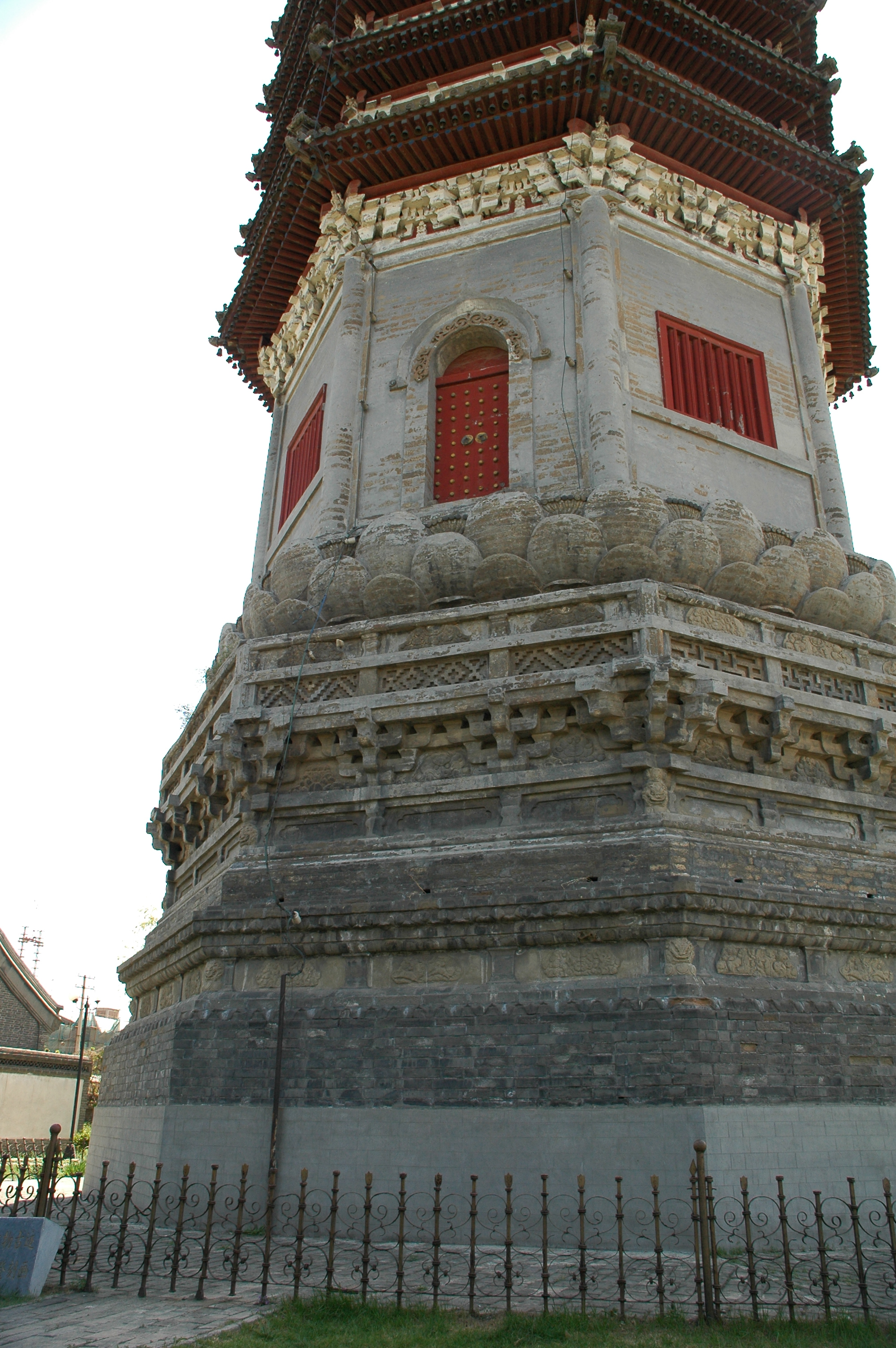 中文（中国大陆）: 燃灯塔－塔基